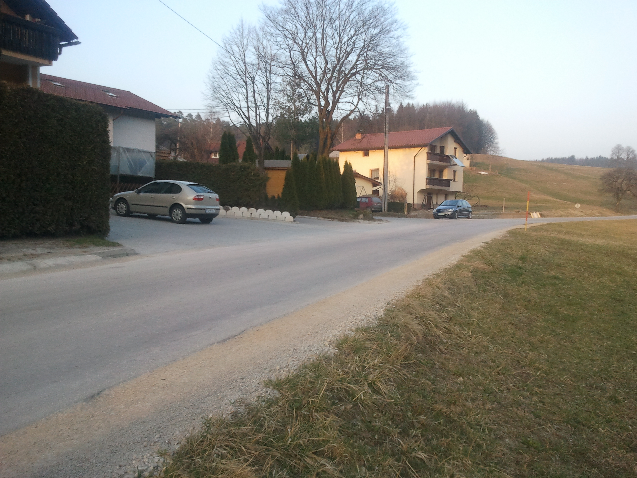 Ilovca; zima 2012